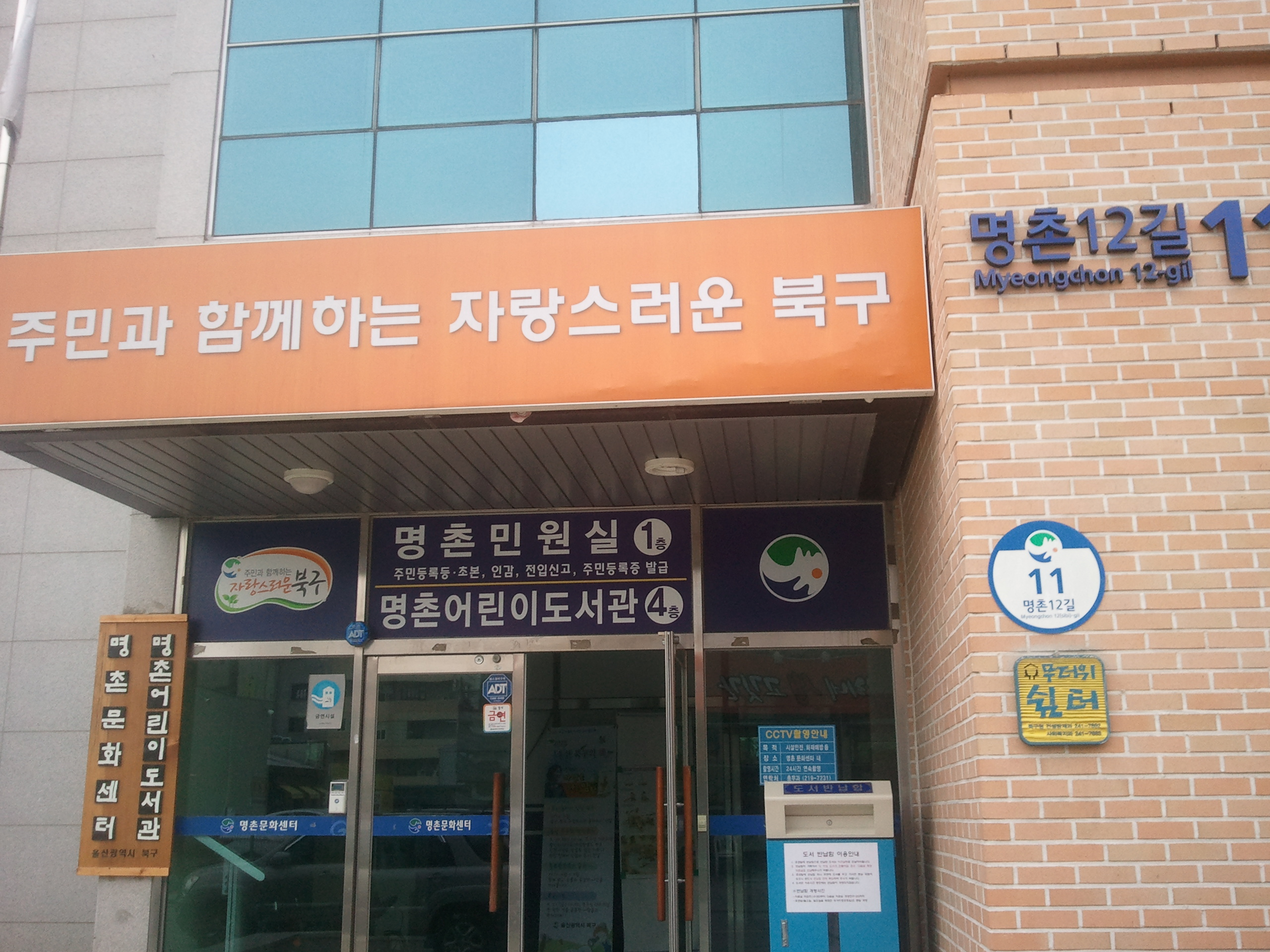 명촌문화센터 건물